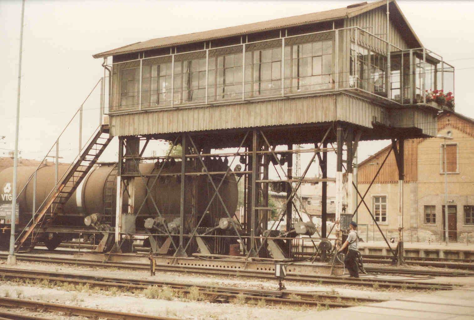 Altes Reiterstellwerk in Konstanz